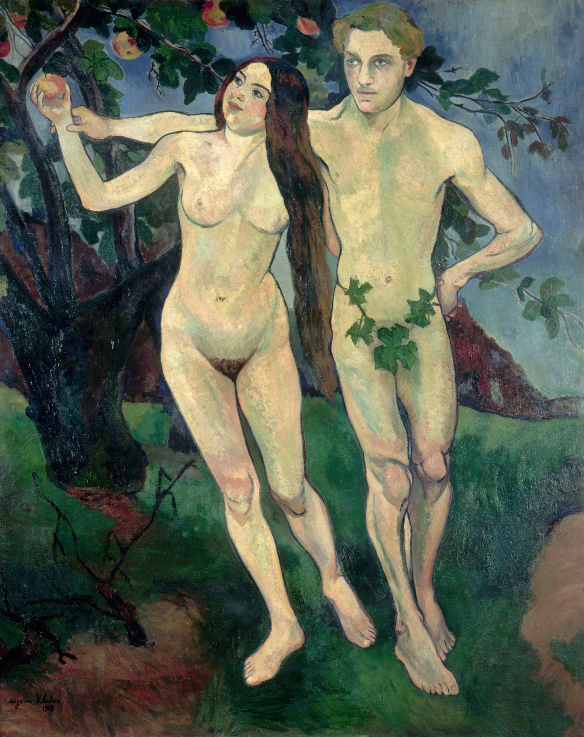 Gemälde, Portrait der Malerin und ihrer Muse als Eva und Adam beim Sündenfall